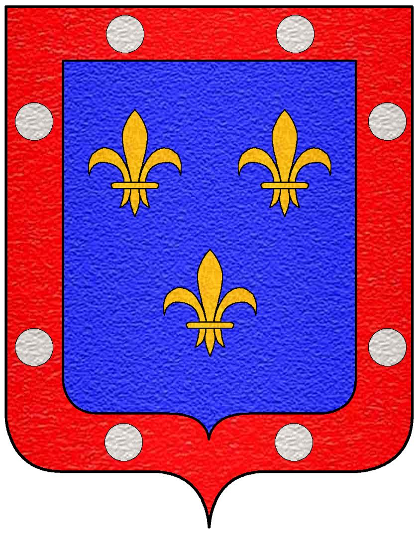 Stemma della famiglia Alancon